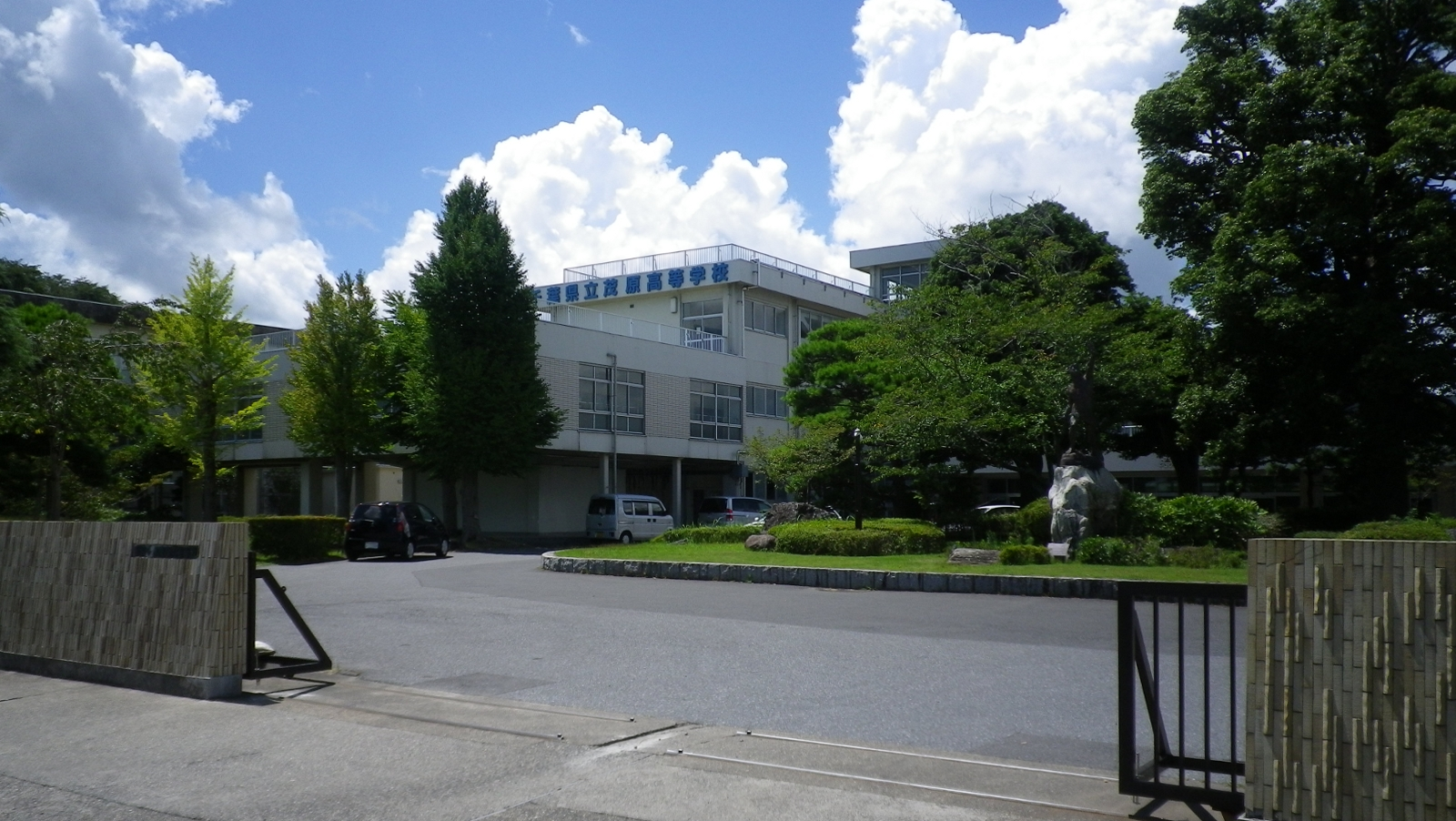 千葉県立茂原高等学校